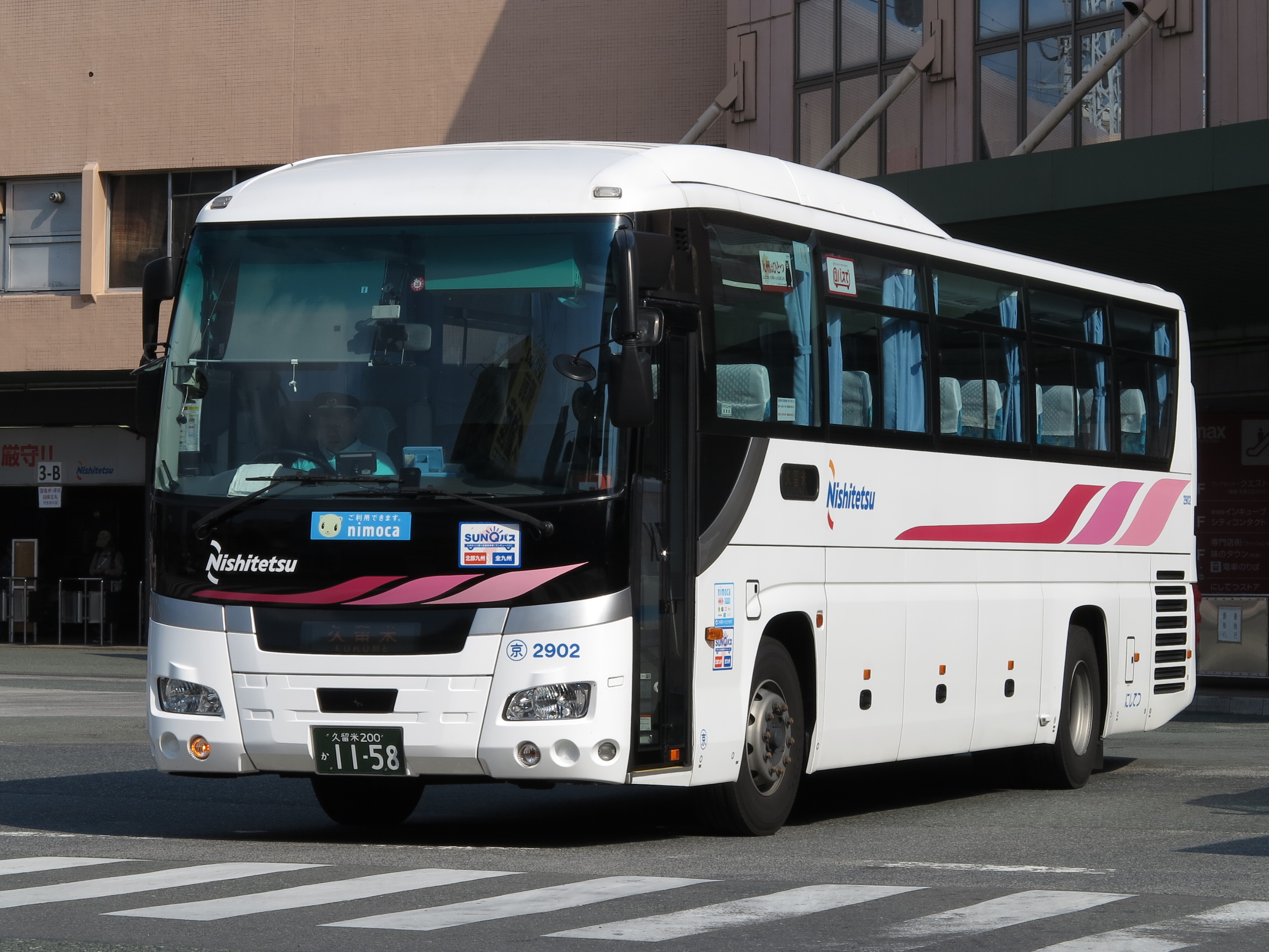 西鉄バス久留米・京町支社 2902号車 西鉄久留米駅前にて